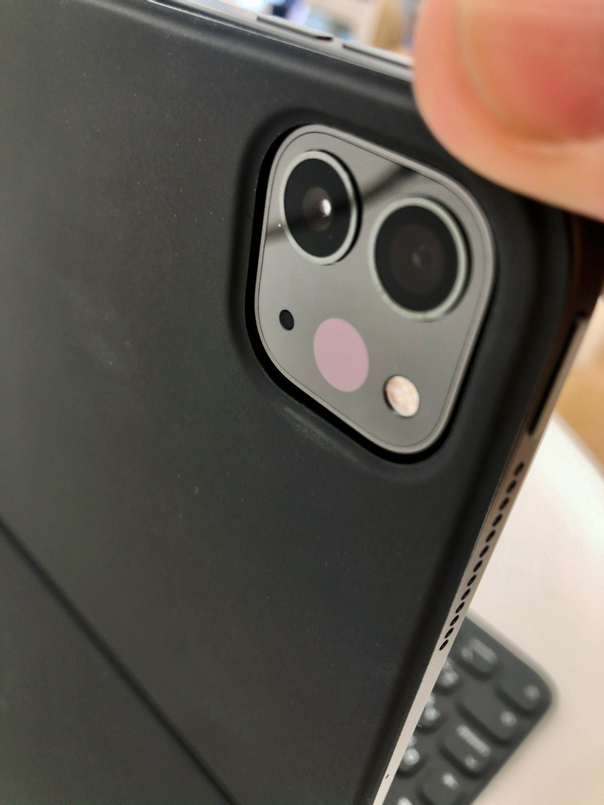 iPad Pro 11インチ（2020年モデル）の背面カメラとLiDARスキャナ。